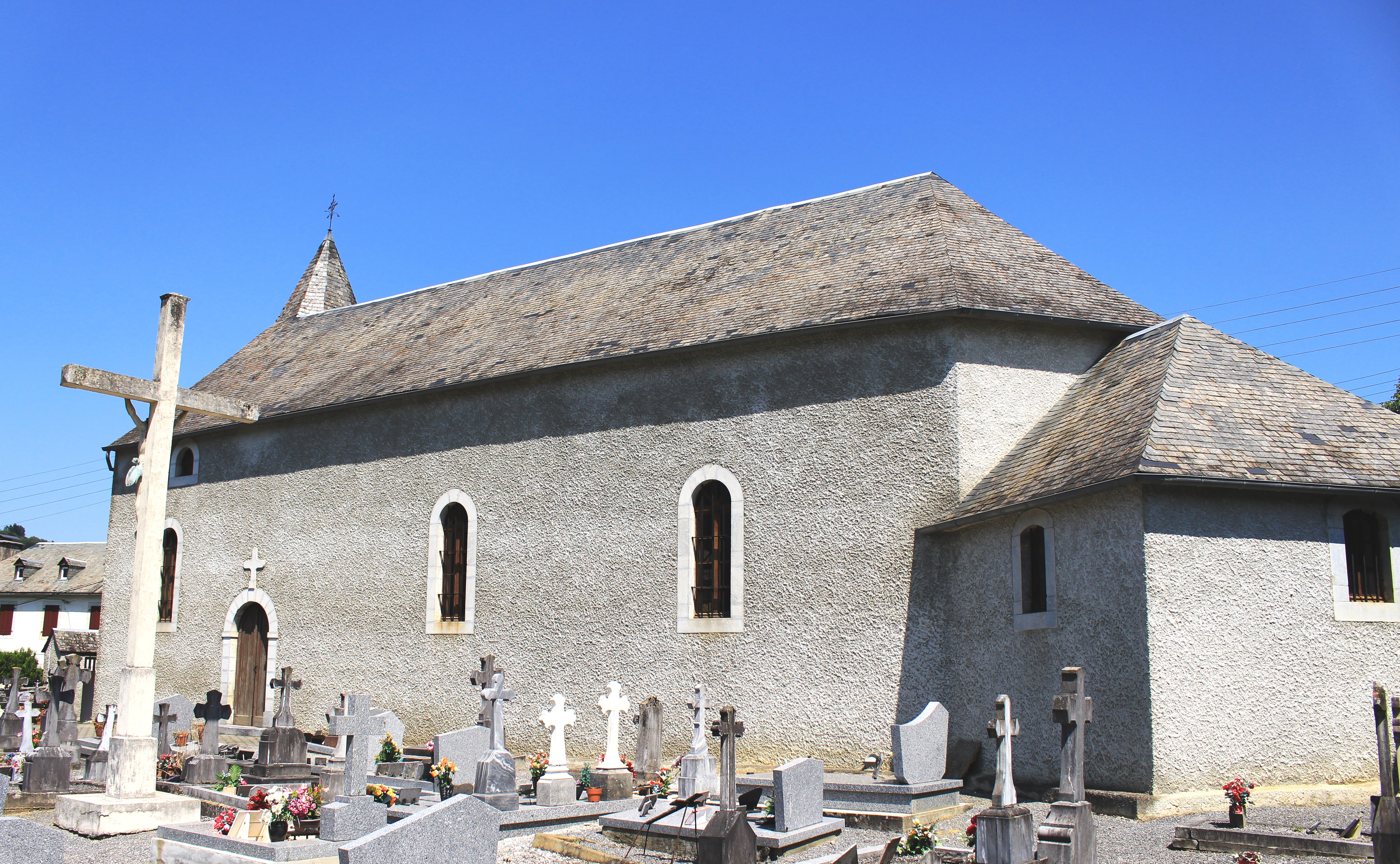 Église Saint-André d'Espèche (Hautes-Pyrénées)